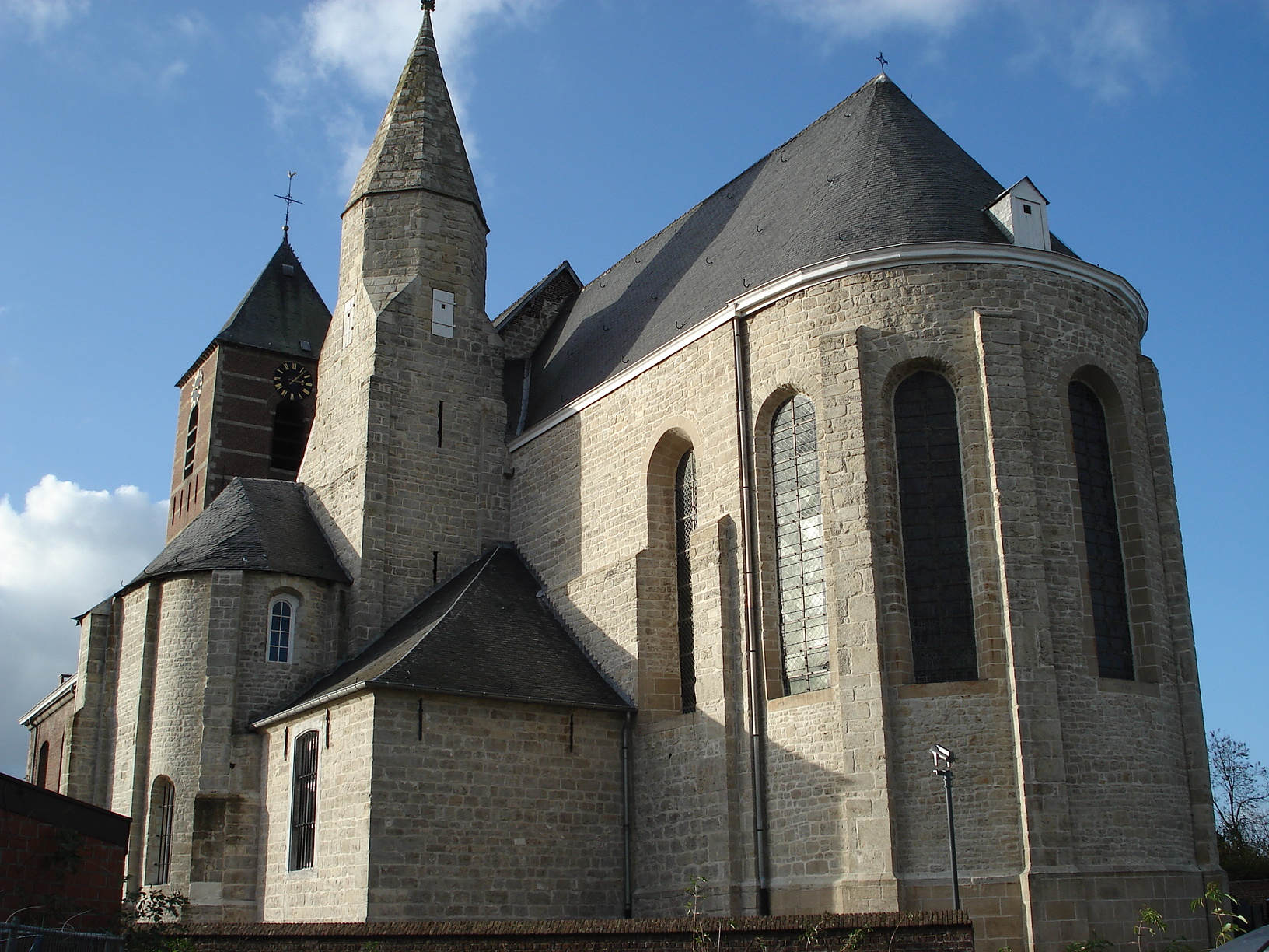 Sint-Lievens-Houtem, België (Oost-Vlaanderen). Sint-Michielskerk, met: romaans koor, flankeertoren, kapel (helemaal links op foto), uit 11e en 12e eeuw. In hoek tussen koor en kapel: sacristie, 18e eeuw. Verder: bakstenen klokkentoren en (amper zichtbaar) bakstenen schip, classicistisch, 1776.